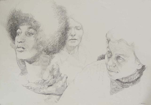 Für Angela Davis, 1972, 43 x 61 cm. Bleistift, Bez. u.r. „Timner 72“